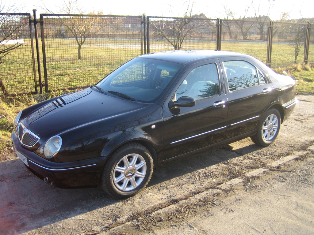 Lancia Lybra Sedan w wersji LX